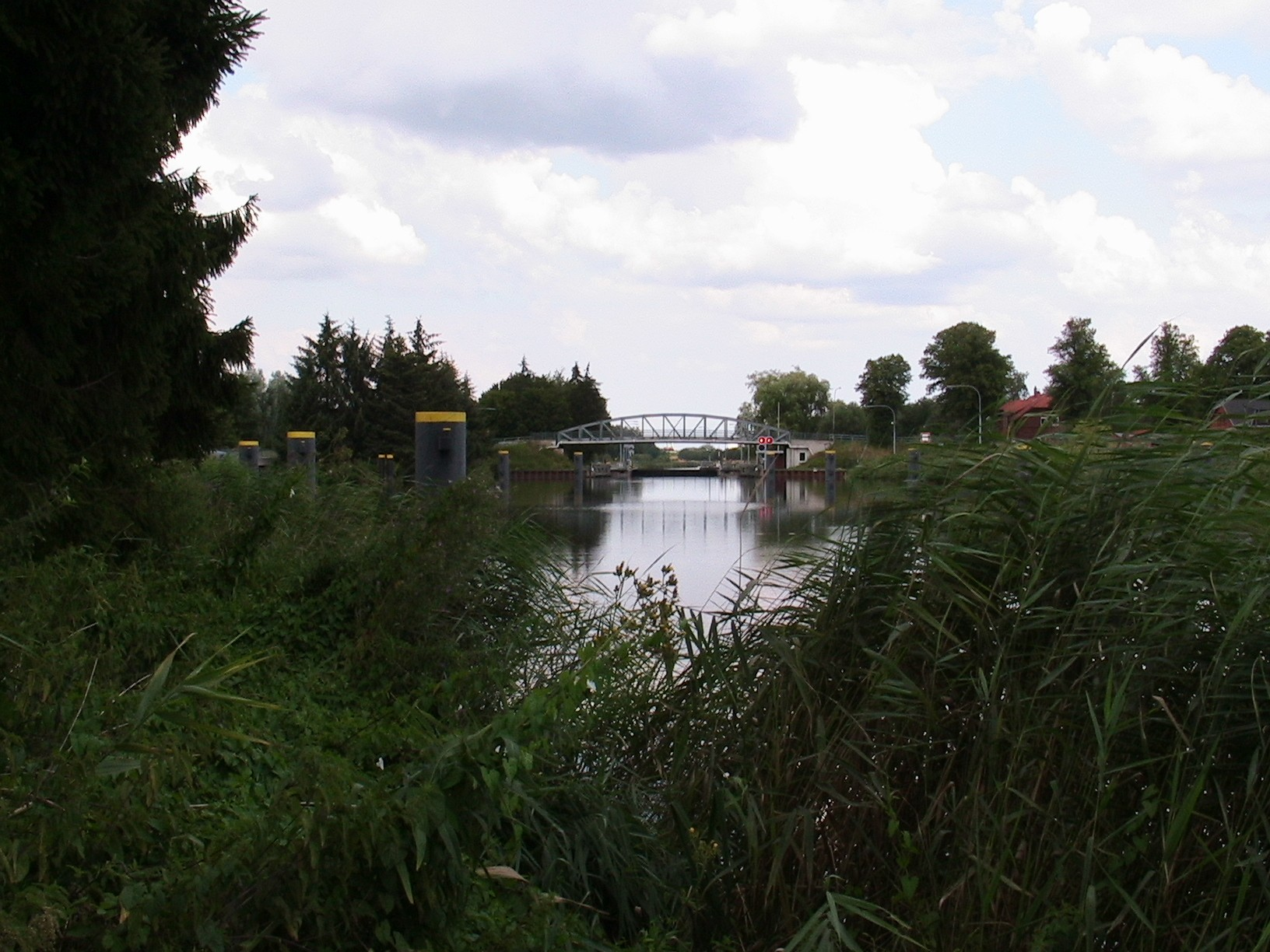 Schleuse Lübeck-Büssau am Elbe-Lübeck-Kanal / Büssau lock at Elbe-Lübeck Canal south of Lübeck/Germany